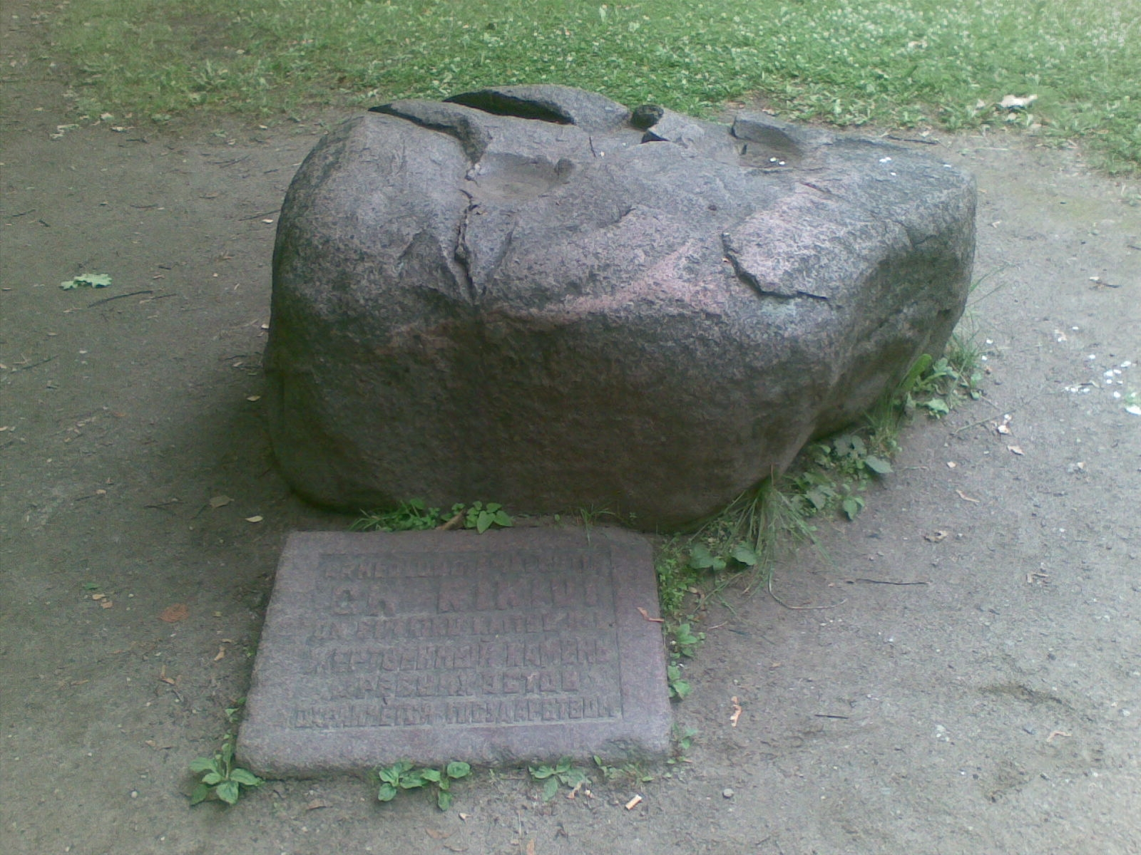 Ohvrikivi Tartu Toomemäel.